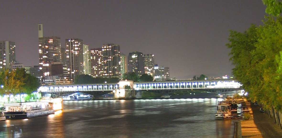 Vue de nuit du Pont de Bir-Hakeim et du Front-de-Seine, depuis le port Debilly Catégorie:Ligne 6 du métro de Paris